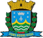 Descrição no link do brasao